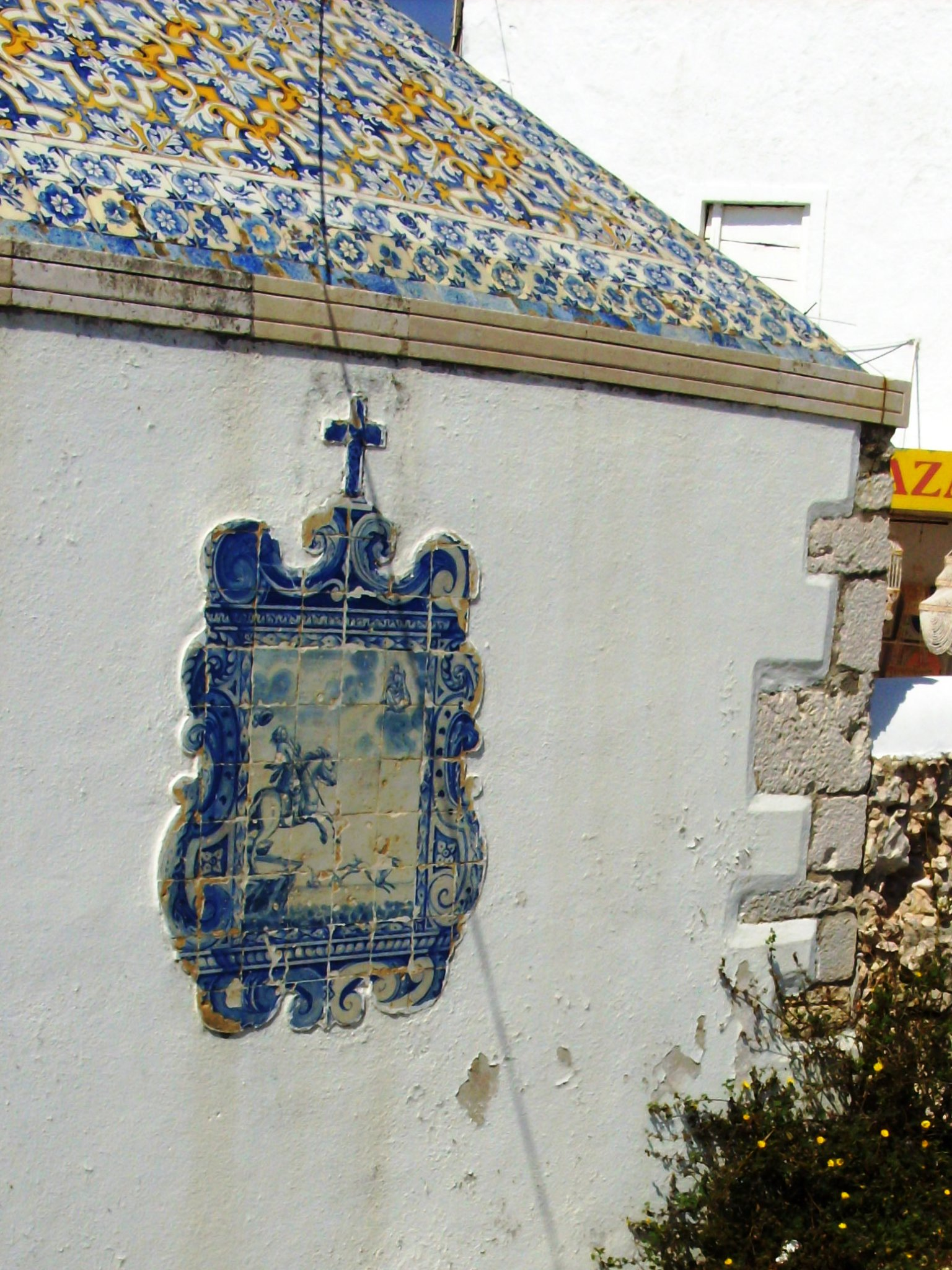 Ermida da Memória, sítio da Nazaré, vila e concelho da Nazaré, distrito de Leiria, Portugal: alçado sul com painel de azulejos mostrando o milagre de D. Fuas Roupinho.